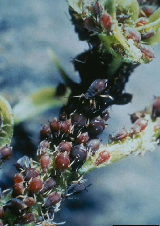 Colonie de pucerons Toxoptera citricidus sur pousse d'oranger